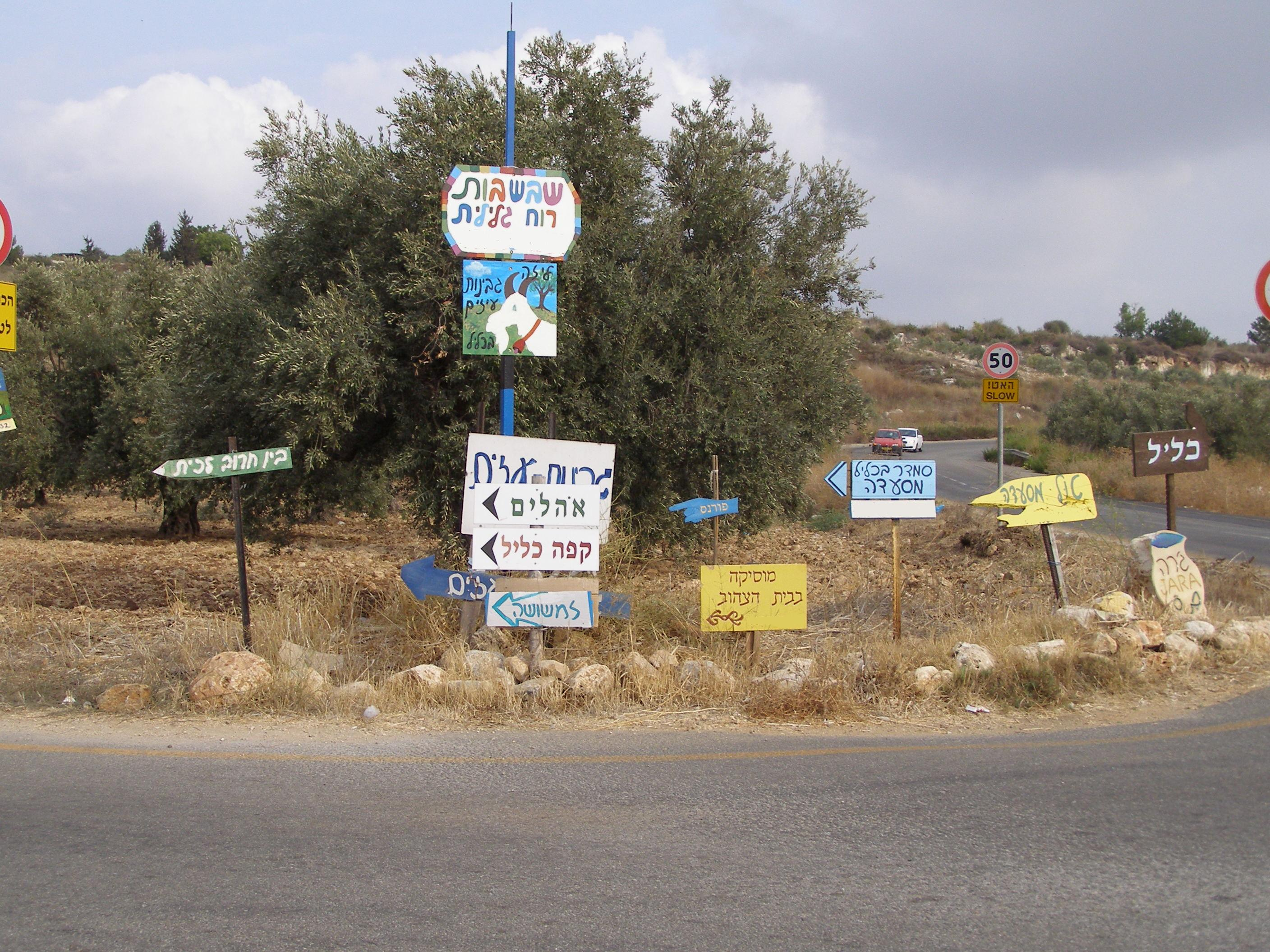 הכניסה לישוב כליל רישיון נוצר על ידי משתמש:Ranbar